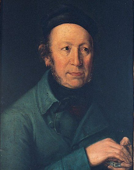 Autoritratto di Giovanni Tebaldi (1787-1858/62), pittore parmigiano.